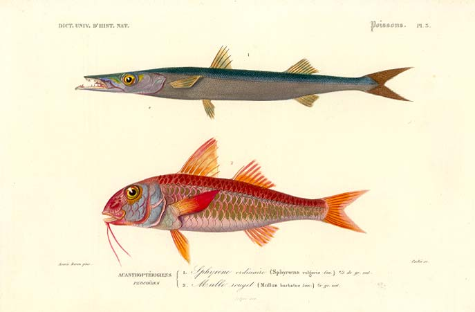 Sphyraena vulgaris = Sphyraena sphyraena (top) Mullus barbatus = Mullus barbatus barbatus (bottom)